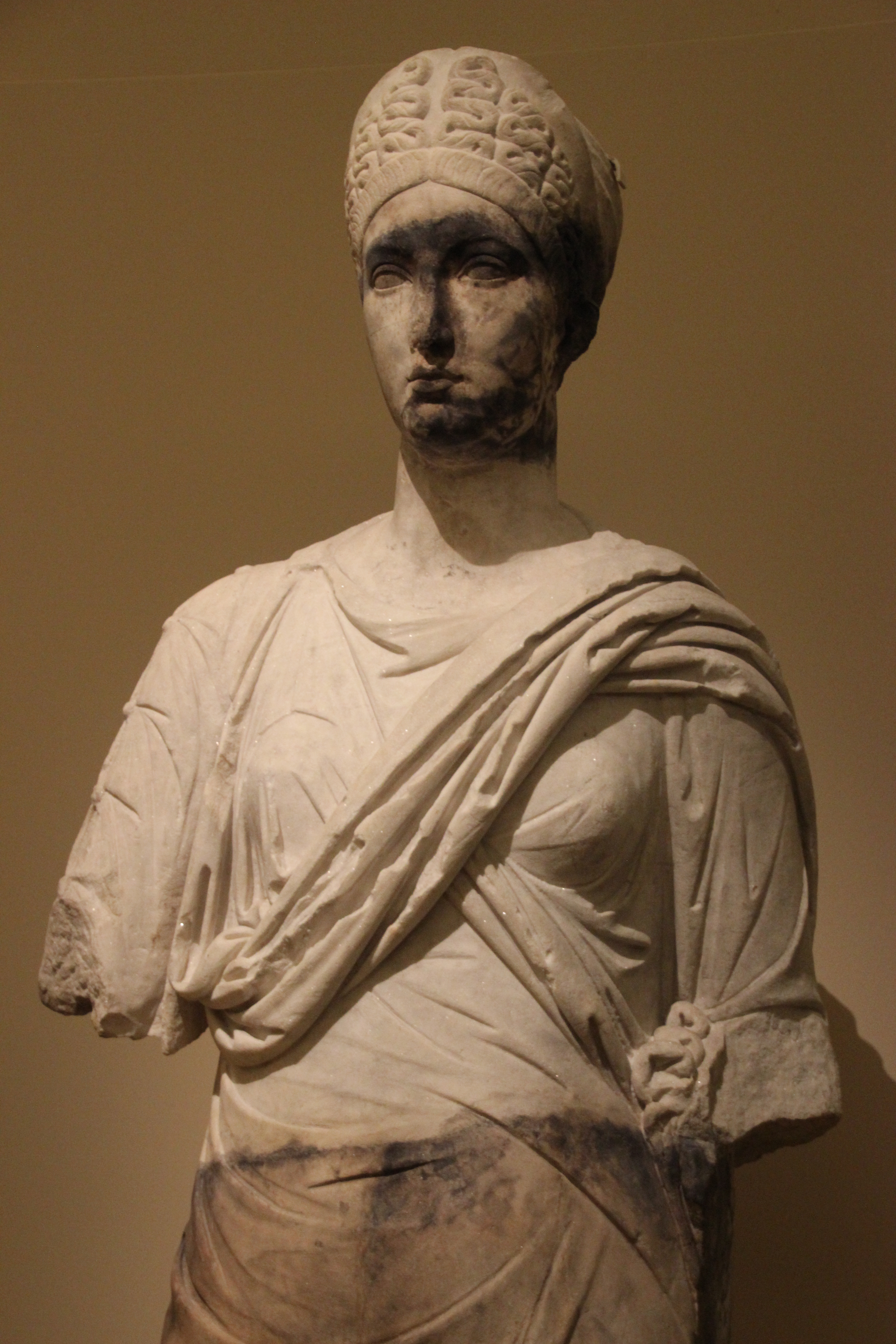 Sculpture of Vibia Sabina Carthage